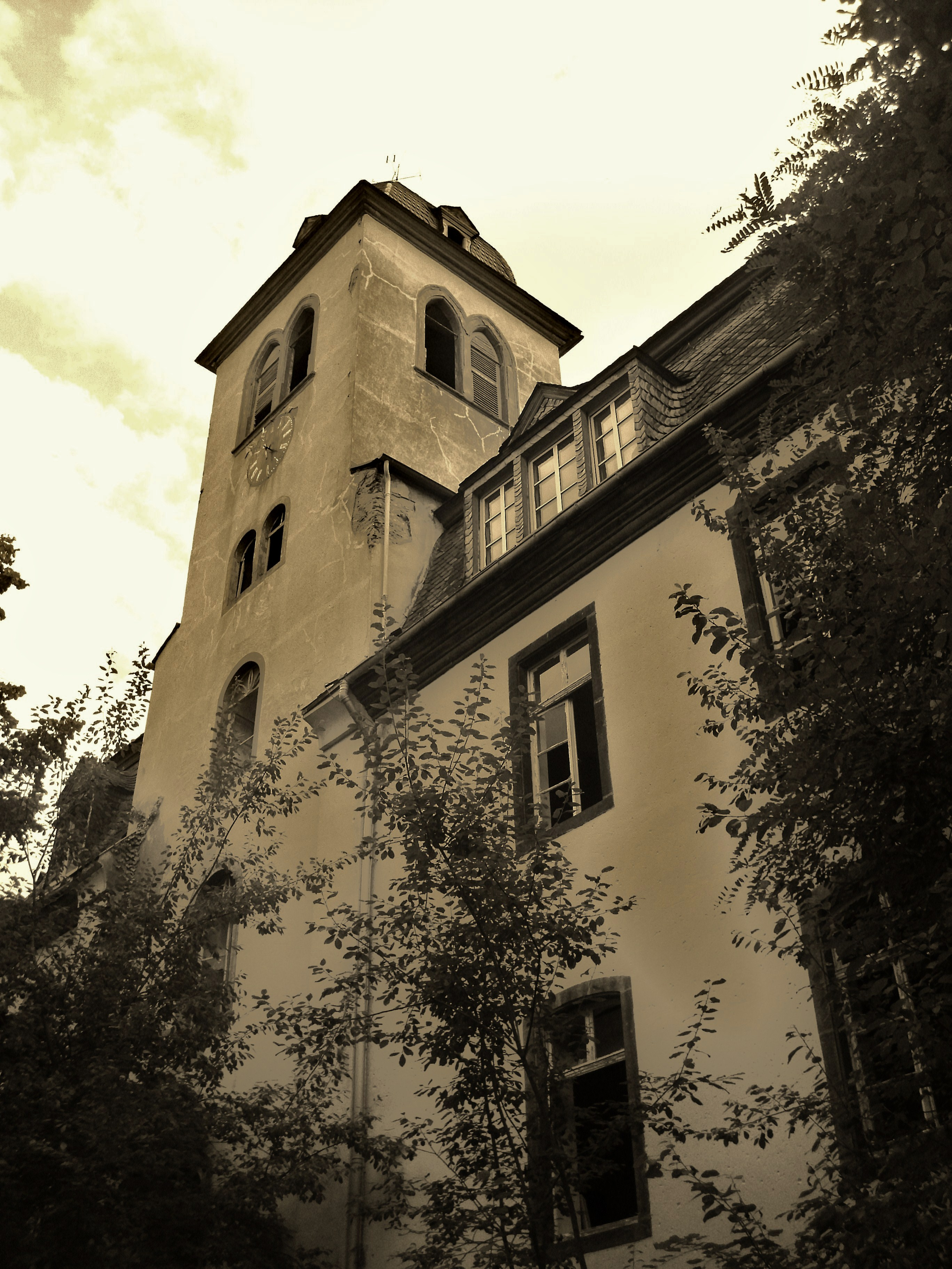 LostPlaceBoppard